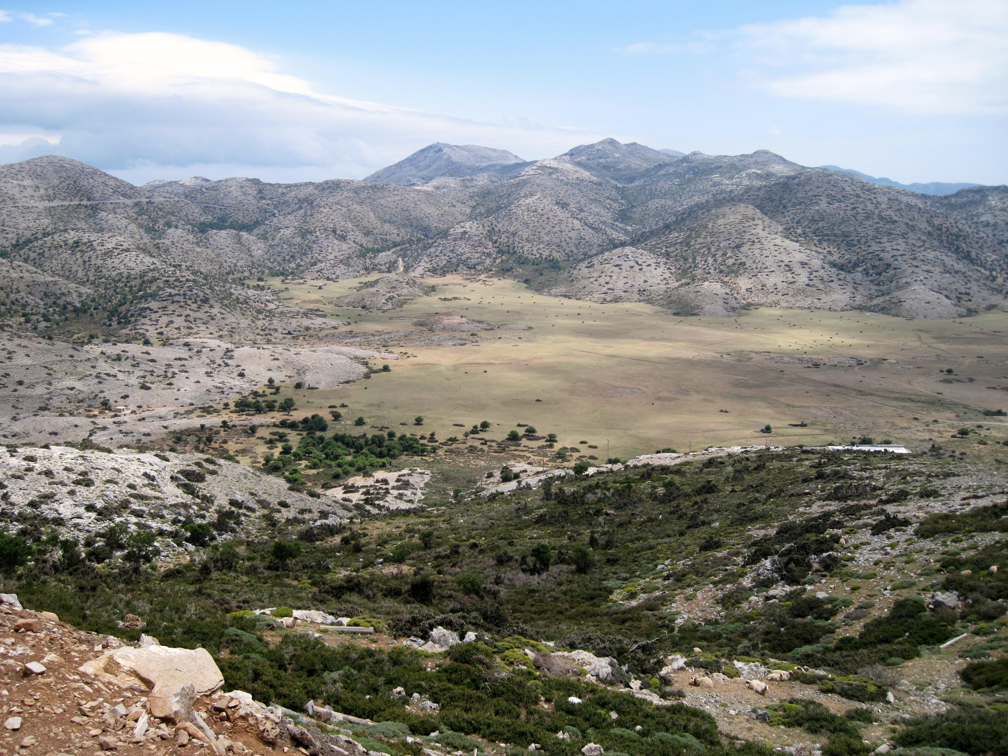 Nida-Hochebene, Gemeinde Anogia, Präfektur Rethymno, Kreta, Griechenland